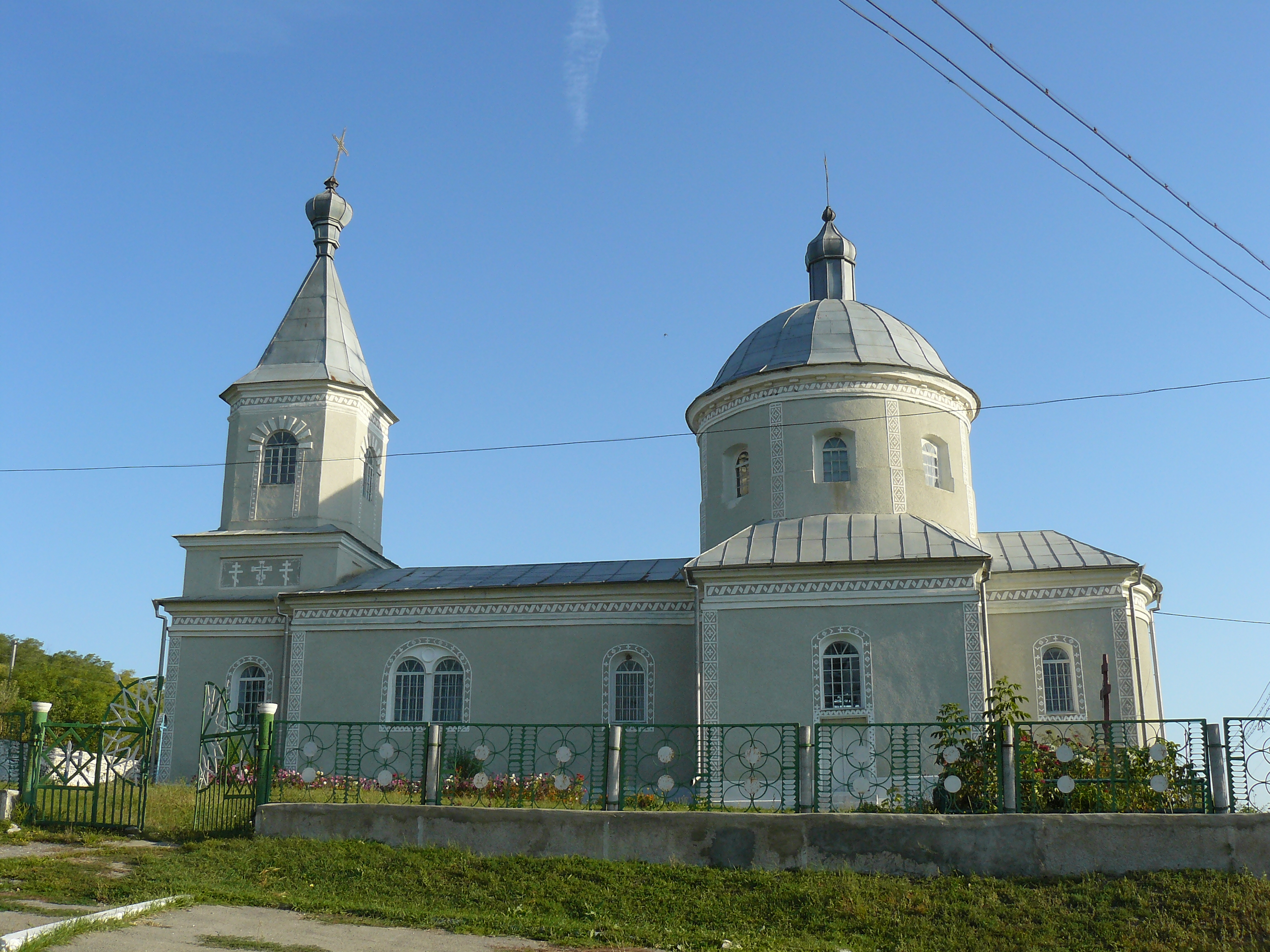 с. Трибусівка